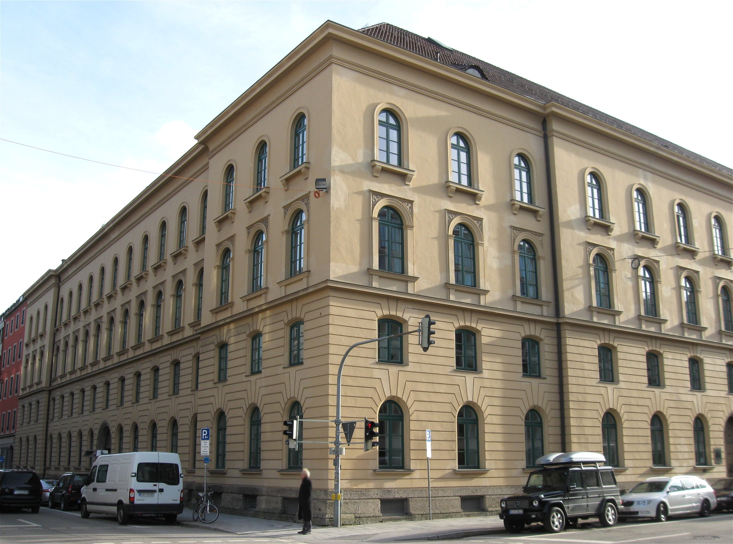 Karlstraße 21; ehem. stattliches Mietshaus mit Frohsinns-Saal, jetzt Finanzamt für Körperschaften, klassizistisches Eckgebäude, 1829 von Joseph Höchl; nur die (z.T. veränderte) Fassade original; mit Katharina-von-Bora-Straße 4.